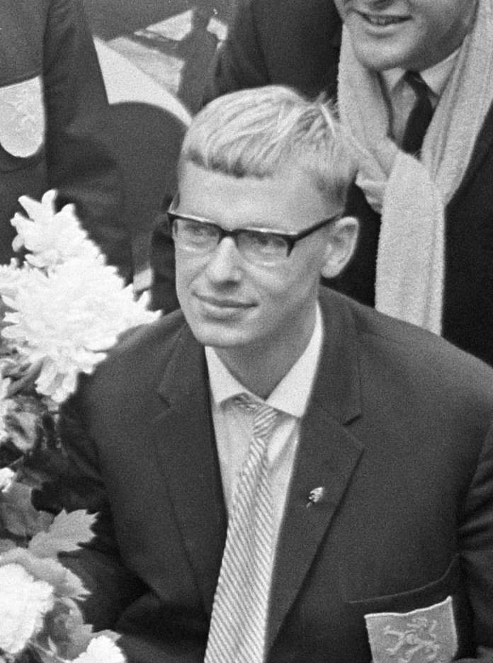 Aankomst van de Nederlandse roeiers op Schiphol na afloop van het wereldkampioenschap roeien te Bled in het voormalig Joegoslavië. Jan van de Graaff